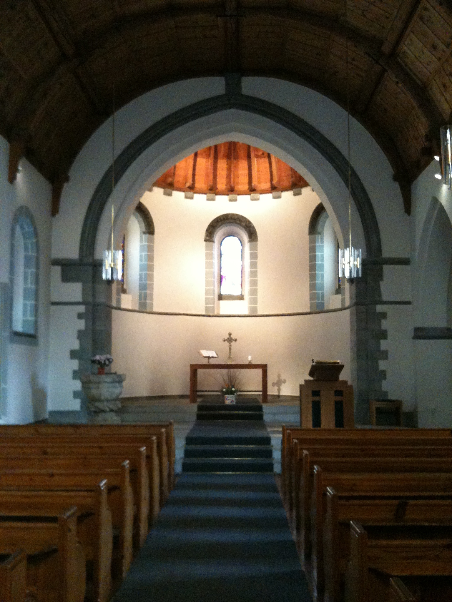 Evangelische Badkirche St. Moritz, Kanton Graubünden